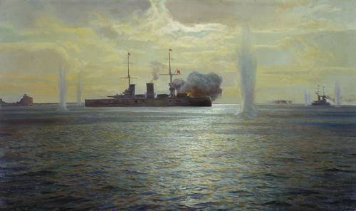 Бубликов Н.Е. Линейные корабли "Андрей Первозванный" и "Петропавловск" ведут огонь по мятежному форту "Красная Горка". 1919 год. 1932. Холст, масло. Центральный военно-морской музей